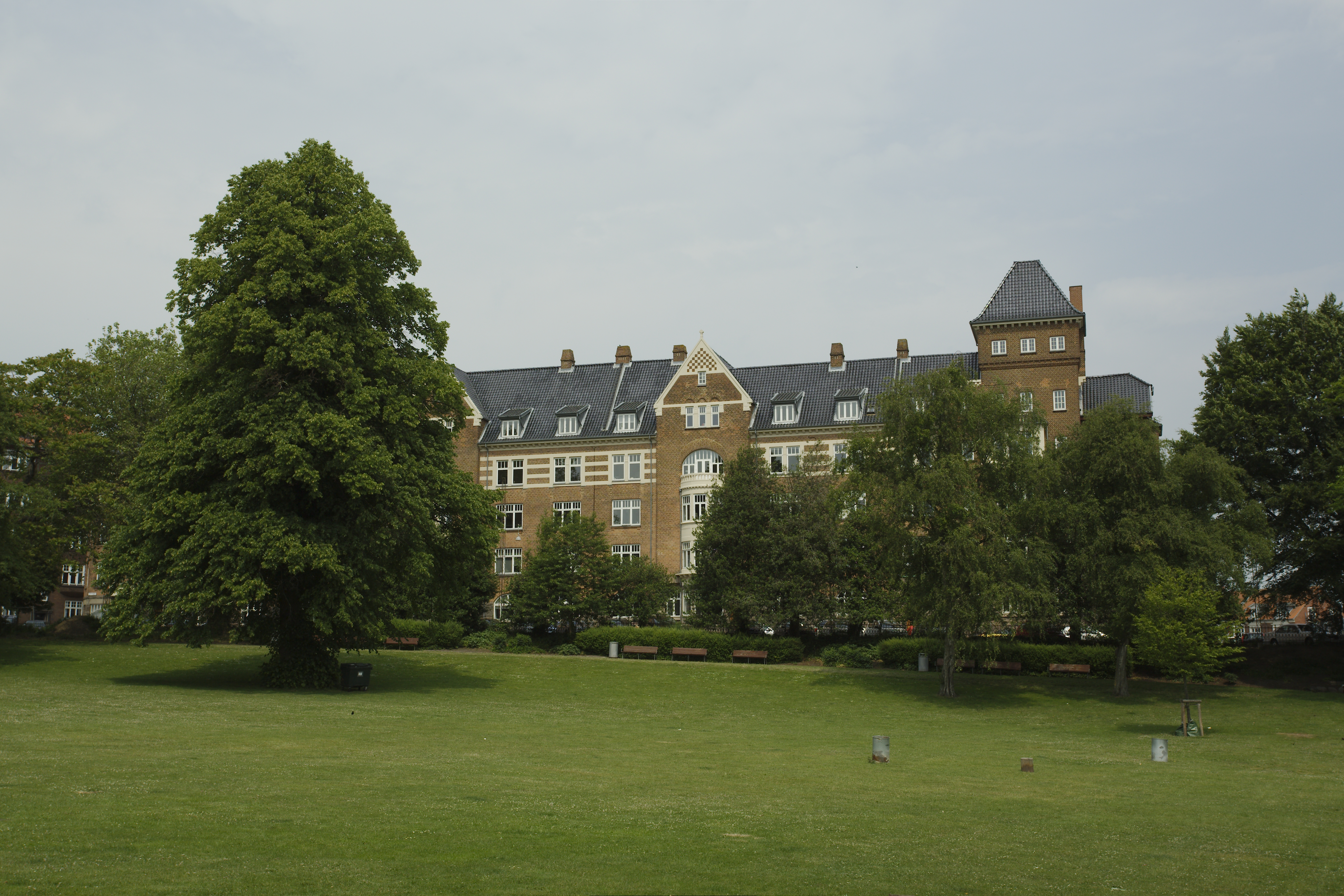 Skansepalæet set fra parken